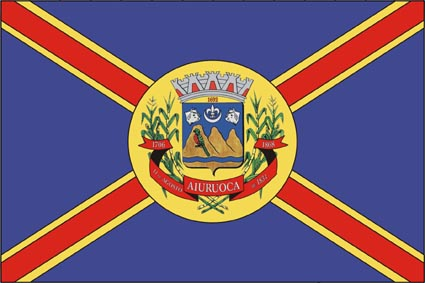 Bandeira de Aiuruoca